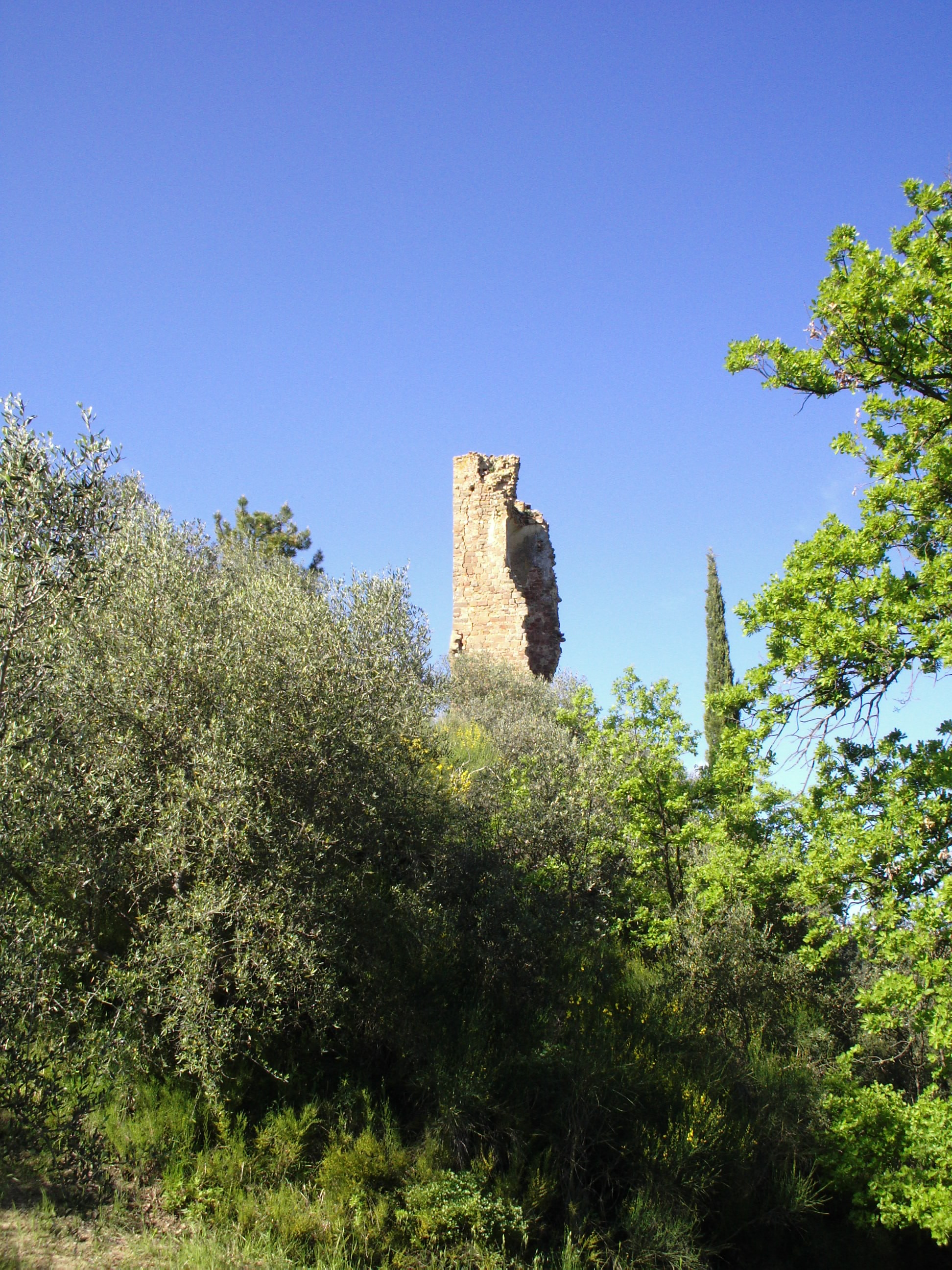 Certaldo, Pogni, rovine del castello